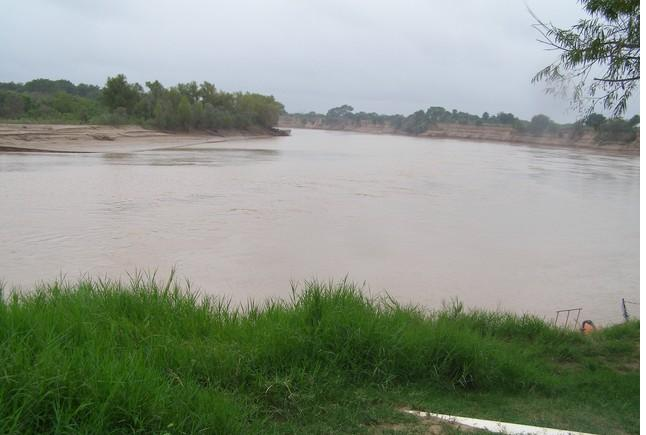 rio bermejo